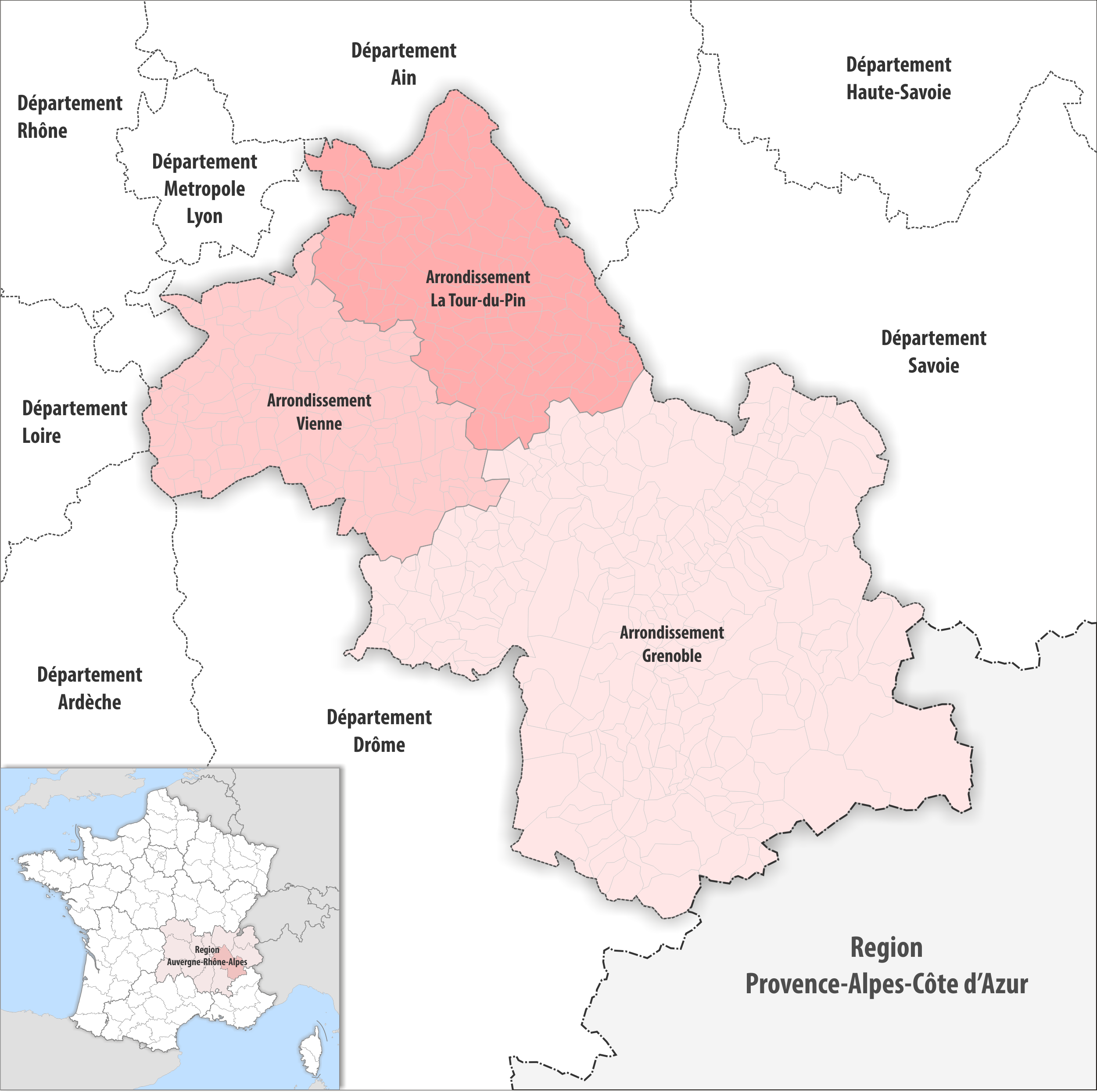 Gemeinden und Arrondissemente im Departement Isère